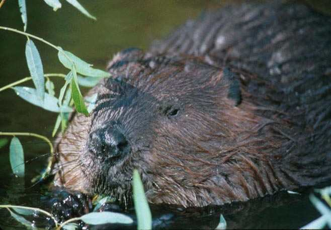 Beaver